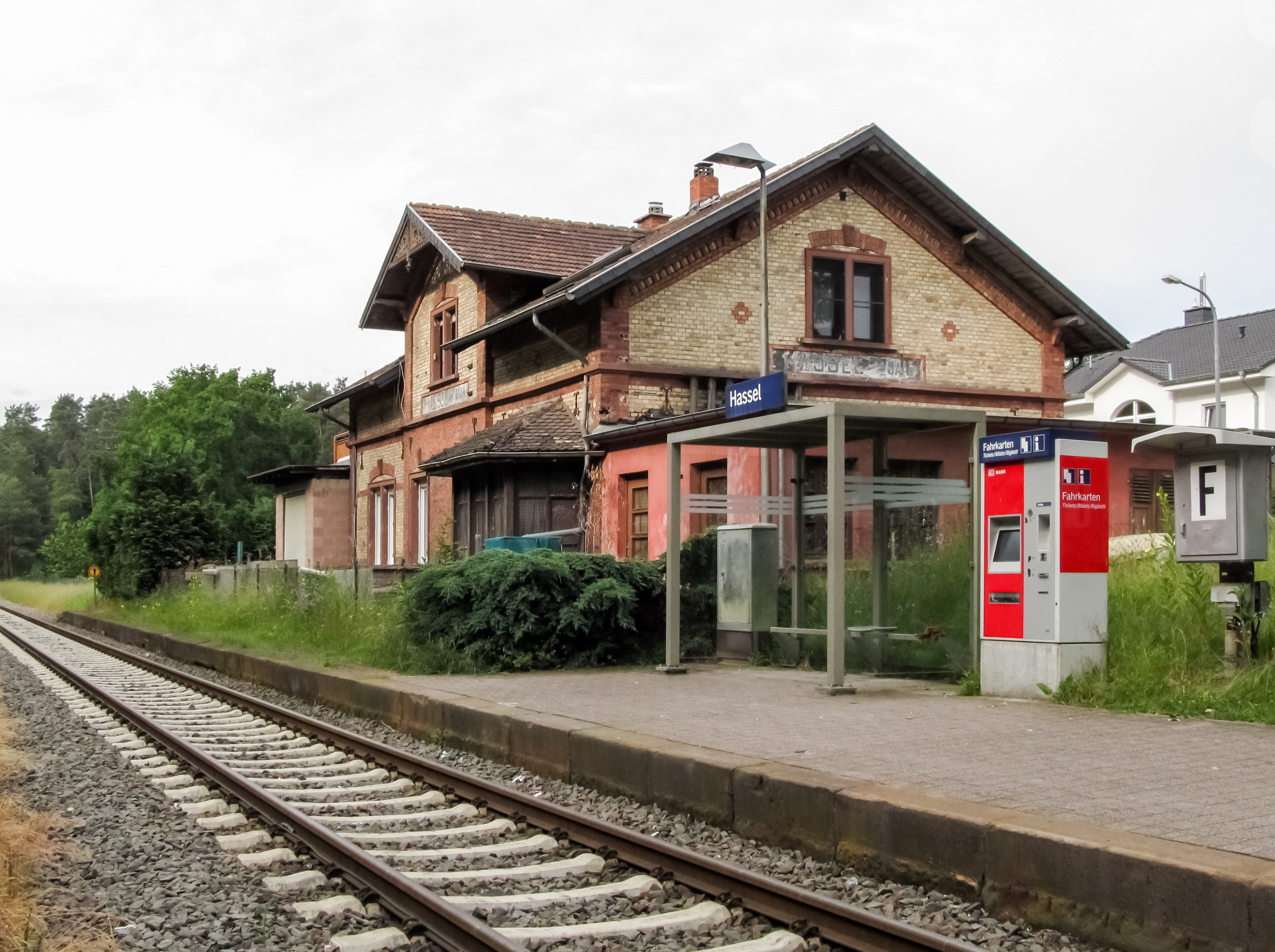 Das ehemalige Bahnhofsgebäude und der DB-Haltepunkt in Hassel/Saar